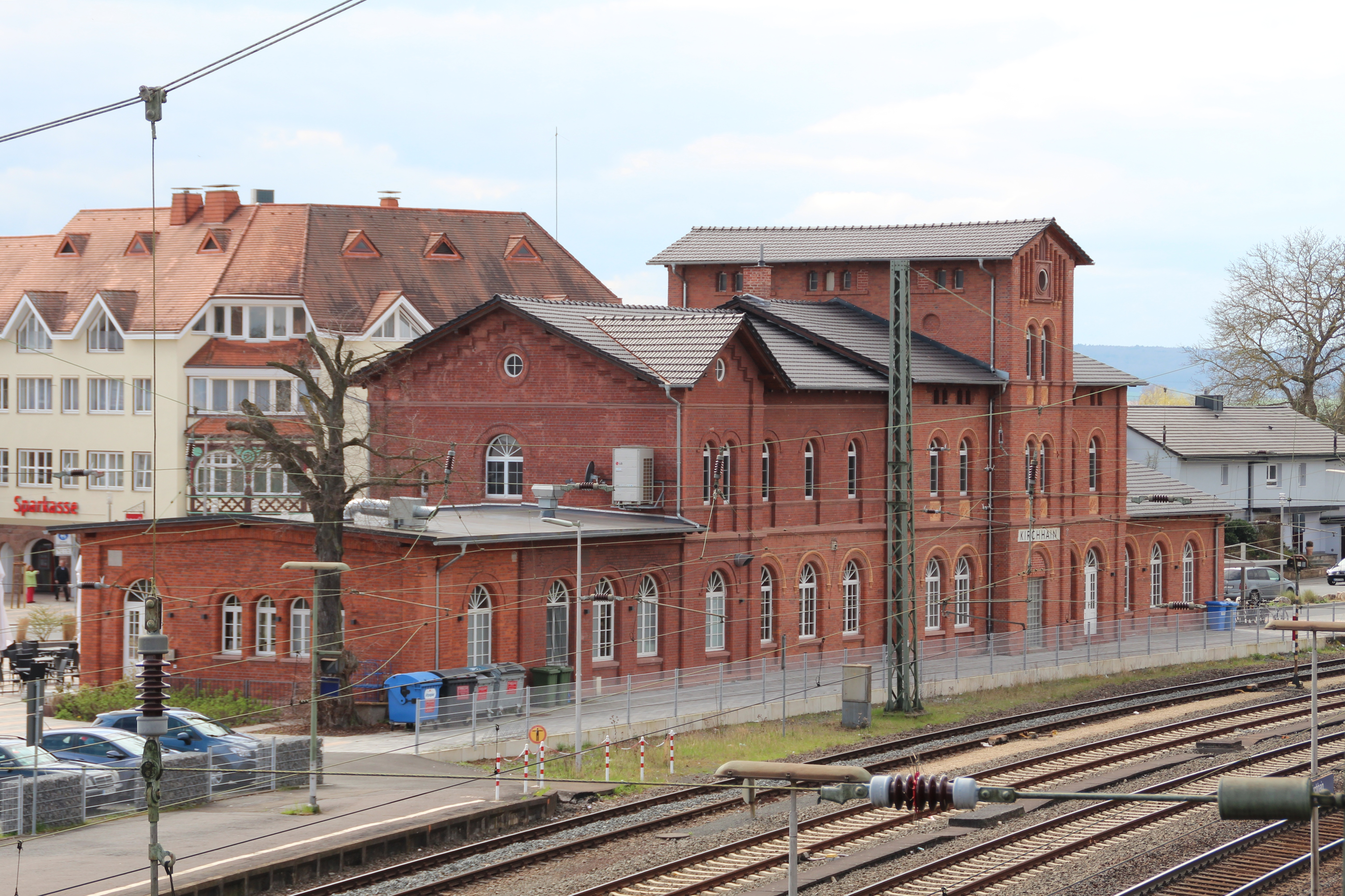 Empfangsgebäudes des Bahnhofs Kirchhain (Bz Kassel) nach der im Dezember 2015 mit der Installation der Uhr abgeschlossenen Renovierung von der Gleisseite aus Richting Nordosten gesehen